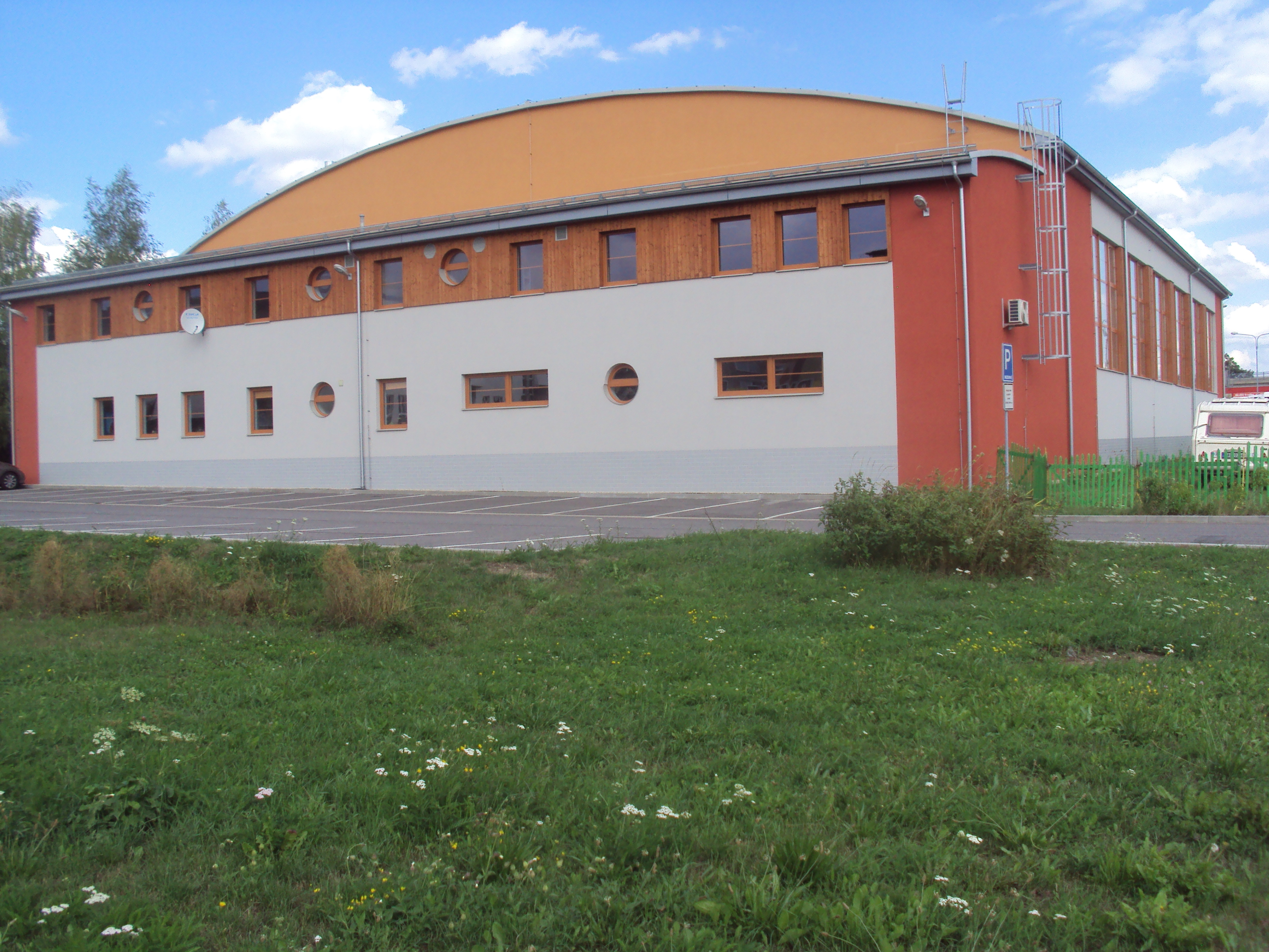 Jiná strana nové sportovní haly v České Lípě z roku 2011